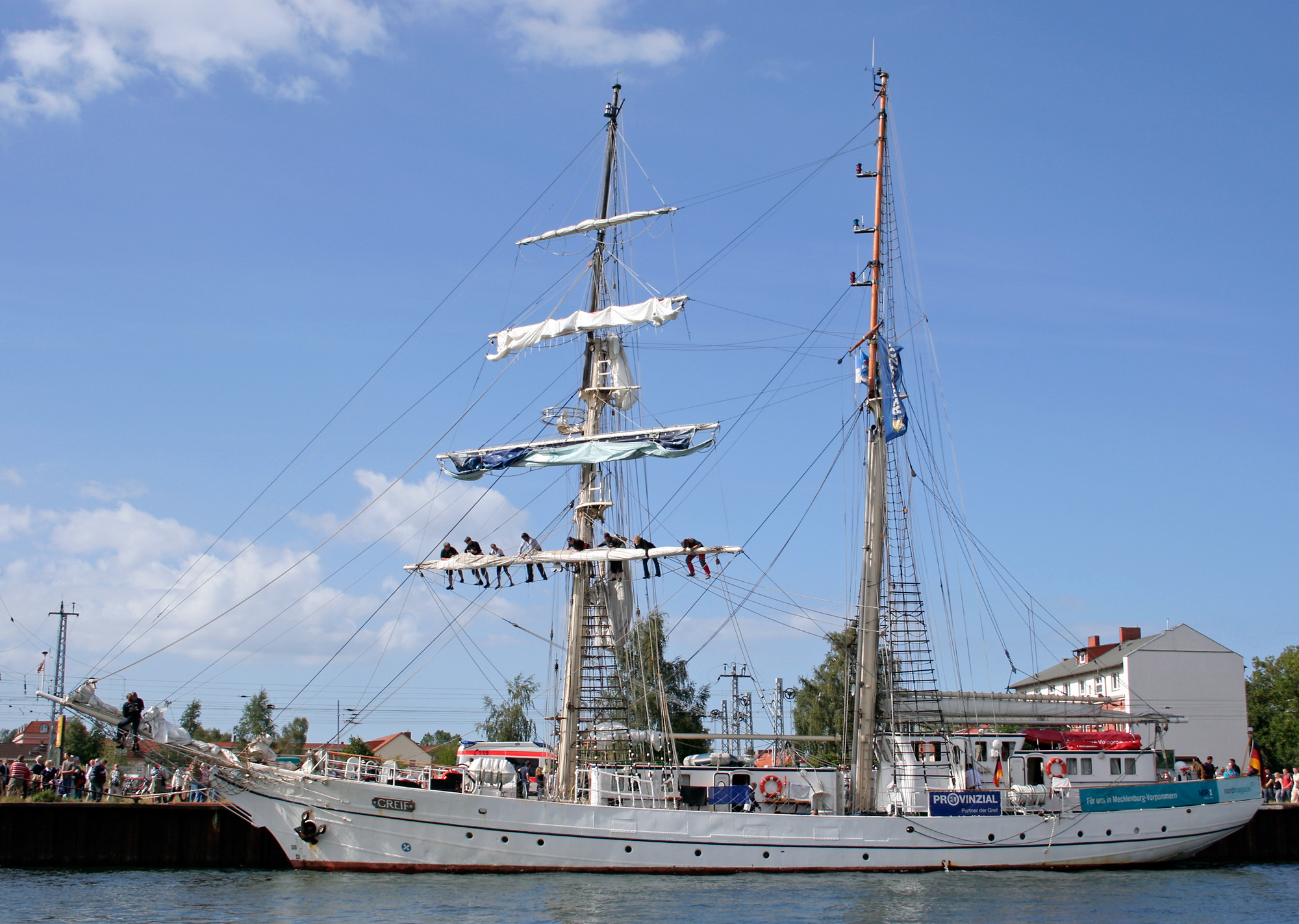 Dieses Bild zeigt das Segelschulschiff Greif (ex "Wilhelm Pieck" (DDR)) anlässlich der Hanse Sail 2008.